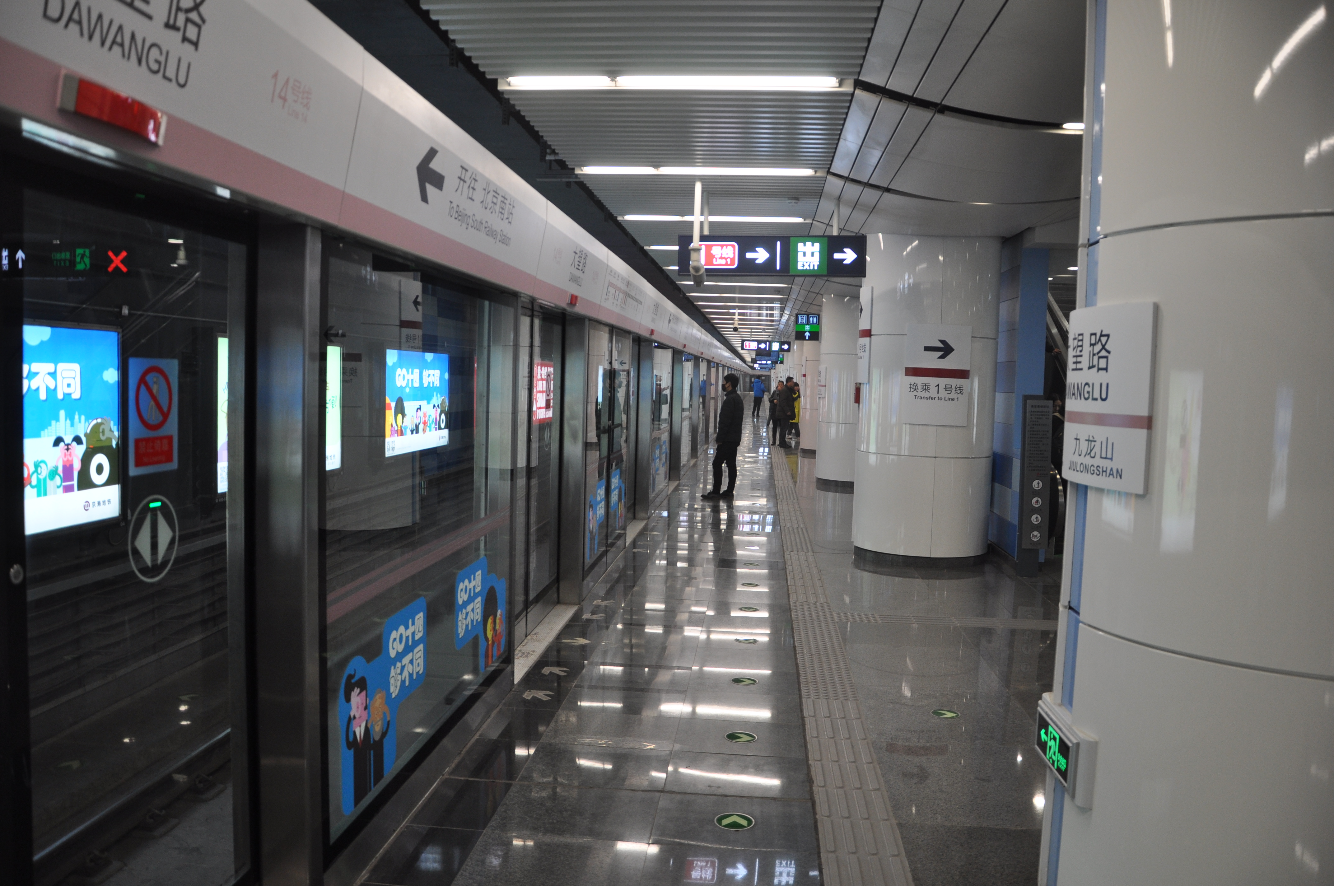 北京地铁14号线大望路站站台